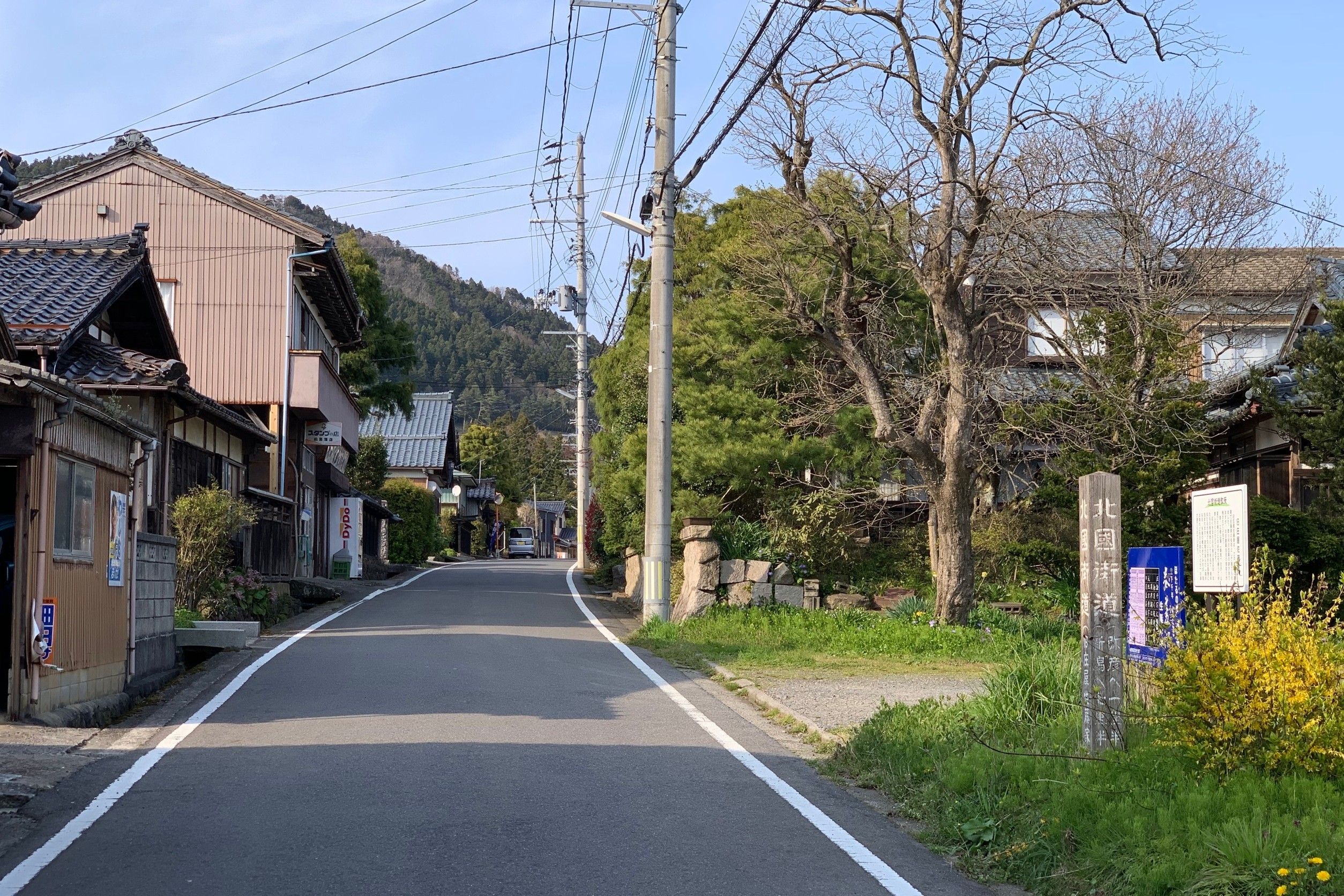 北国街道・福井集落 旧庄屋・佐藤家周辺（新潟市西蒲区，2020年4月）